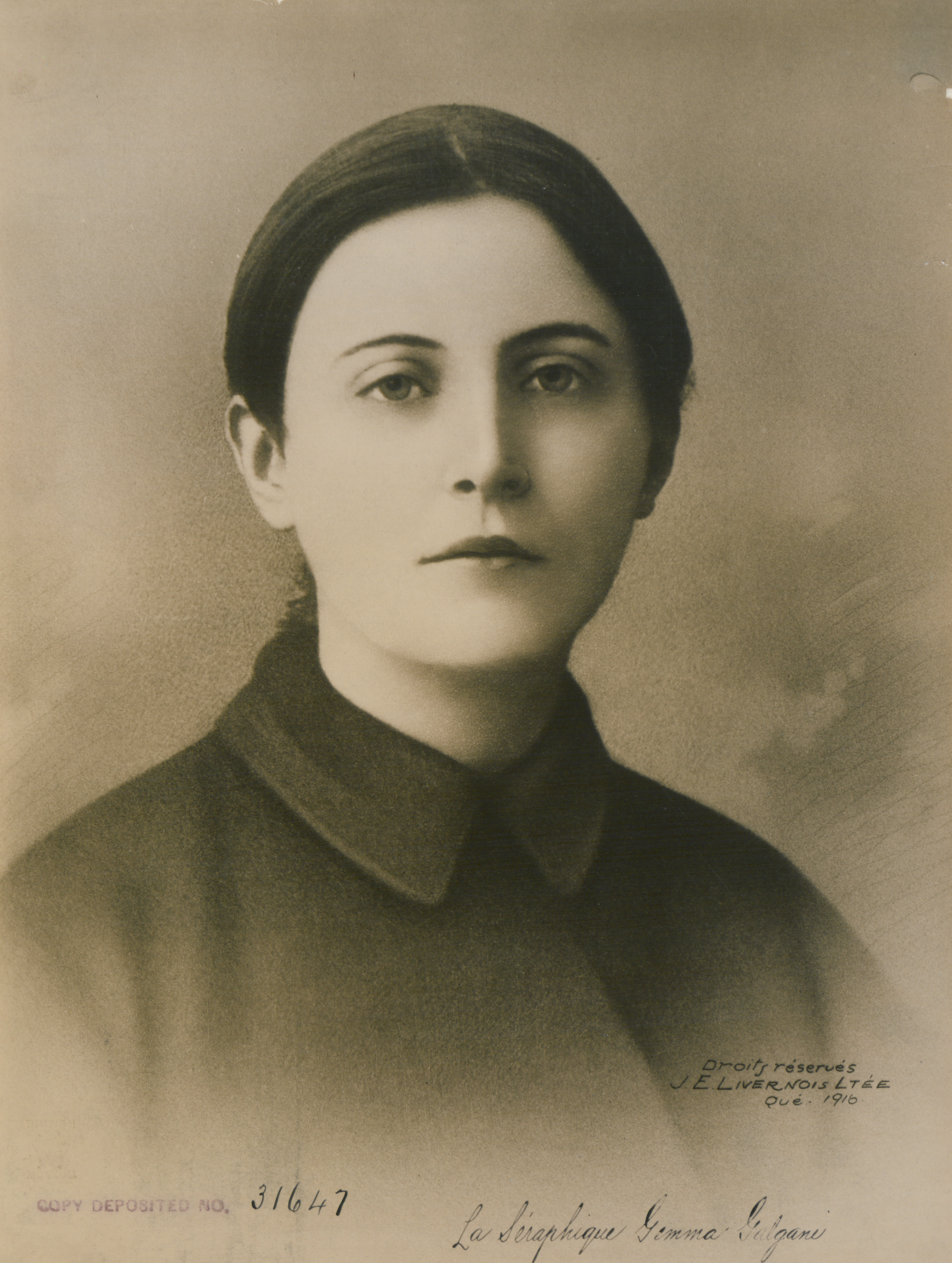 Original caption: “La seraphique Gemma Galgani.”